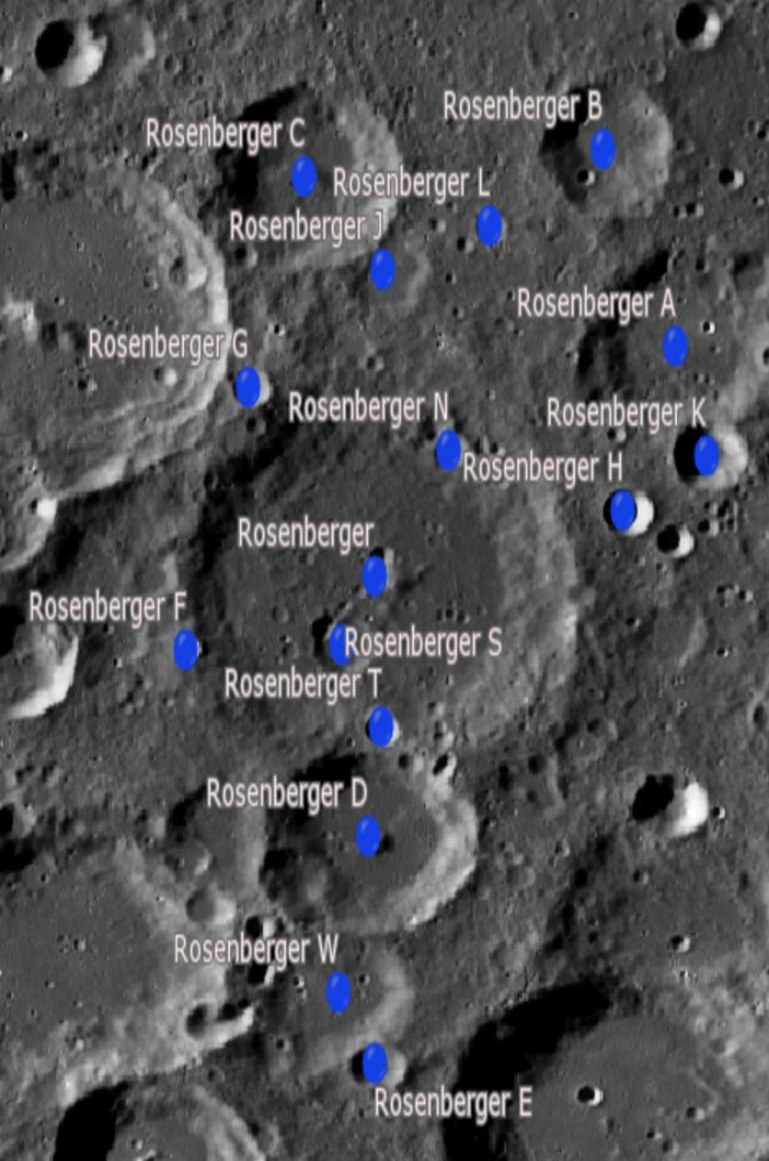 Cráter lunar Rosenberger. Cráteres satélite. (Imagen LRO)